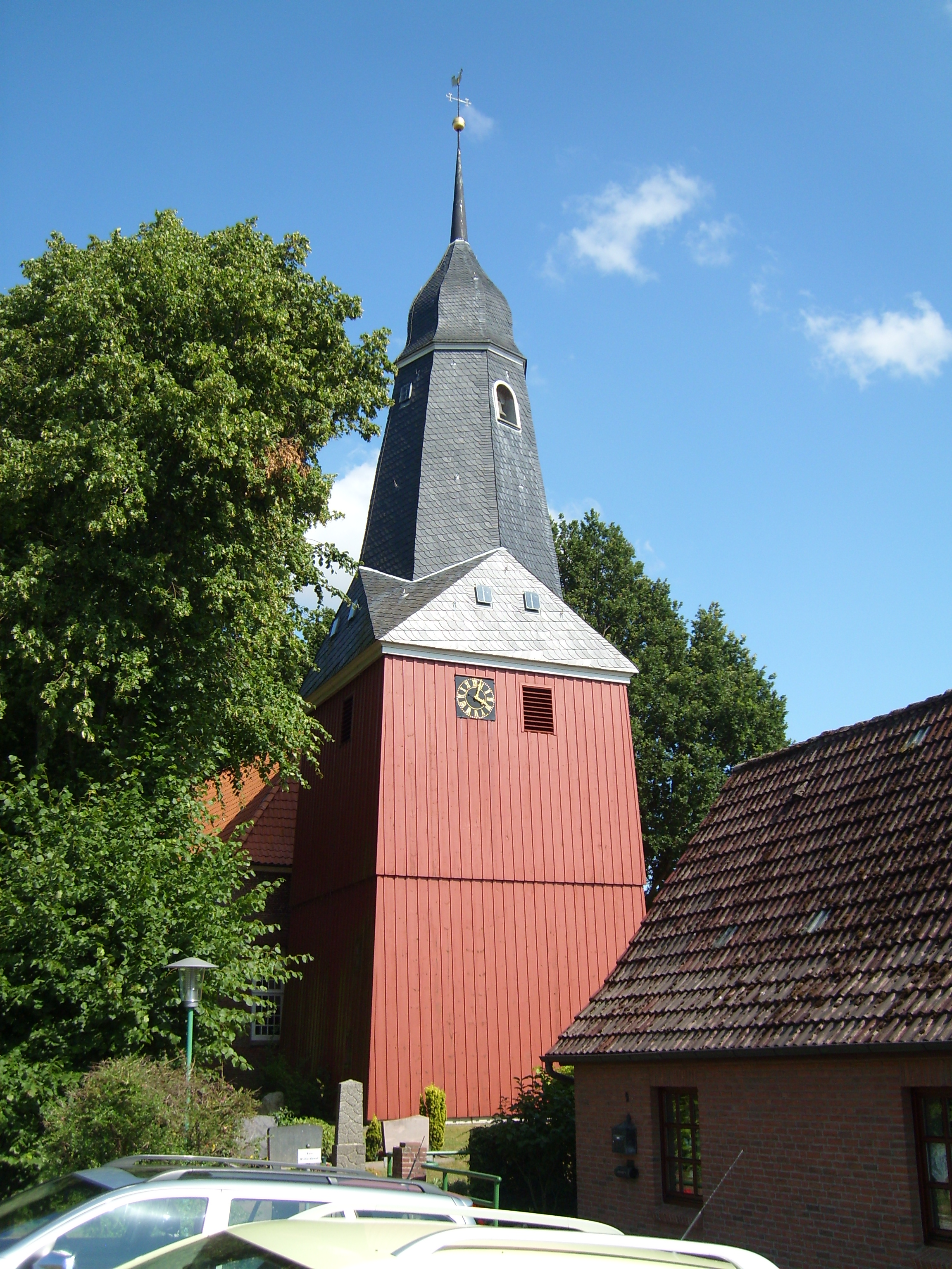 Turm der St.-Nicolai-Kirche Beidenfleth